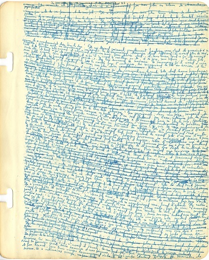 Page détachée d'un cahier et couverte d'une écriture fine et serrée à l'encre bleue.